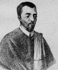 Cristóbal de Santa Catalina nació en Mérida, España el 25 de julio de 1638 y murió el 24 de julio de 1690. Fue un sacerdote eremita que vivió su vida en la práctica de la oración y el silencio, además de fundar la congregación de Franciscanas Hospitalaria de Jesús Nazareno. Murió por infección de la epidemia del cólera.